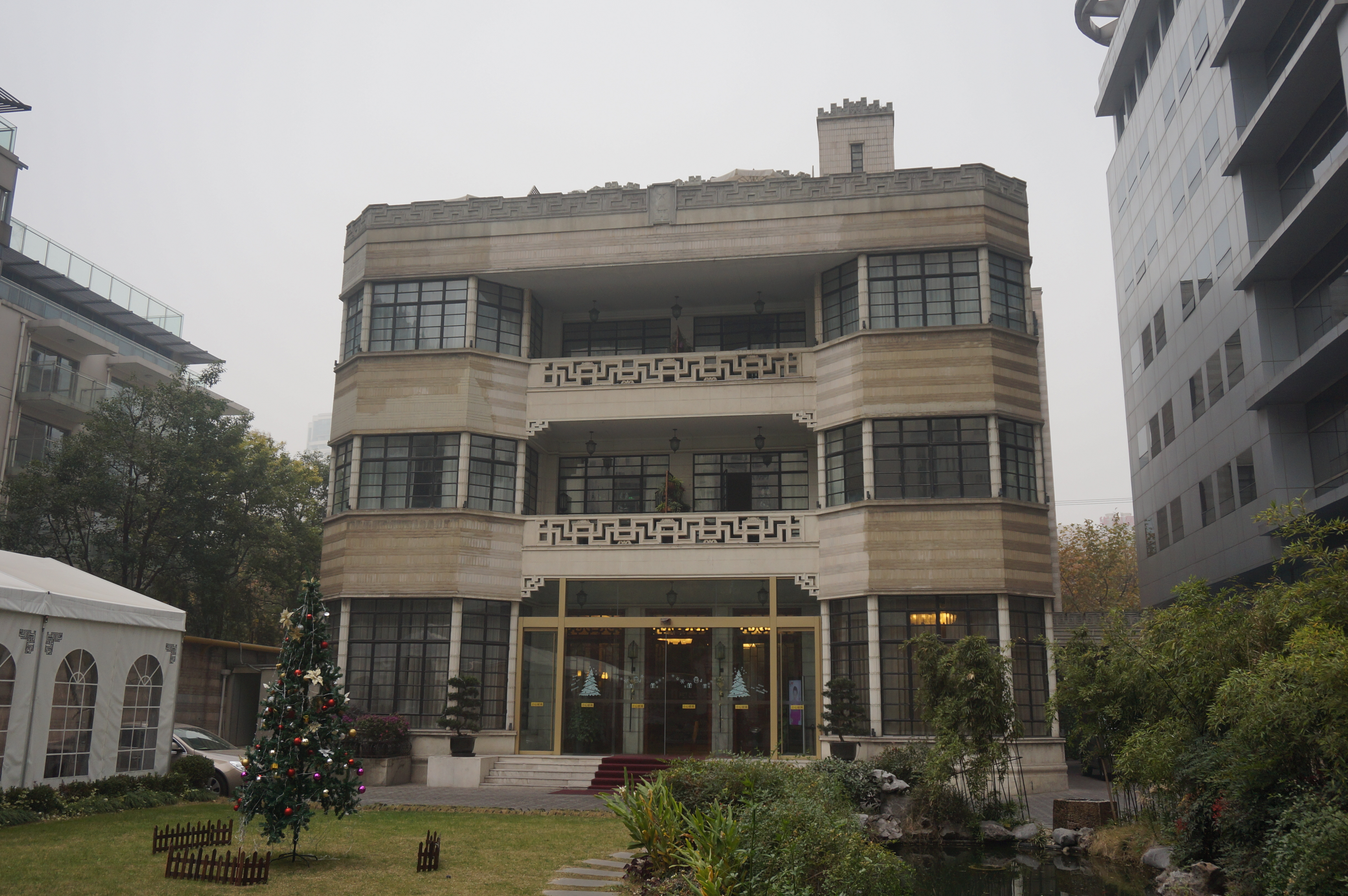 中文（中国大陆）: 贝轩大公馆正面